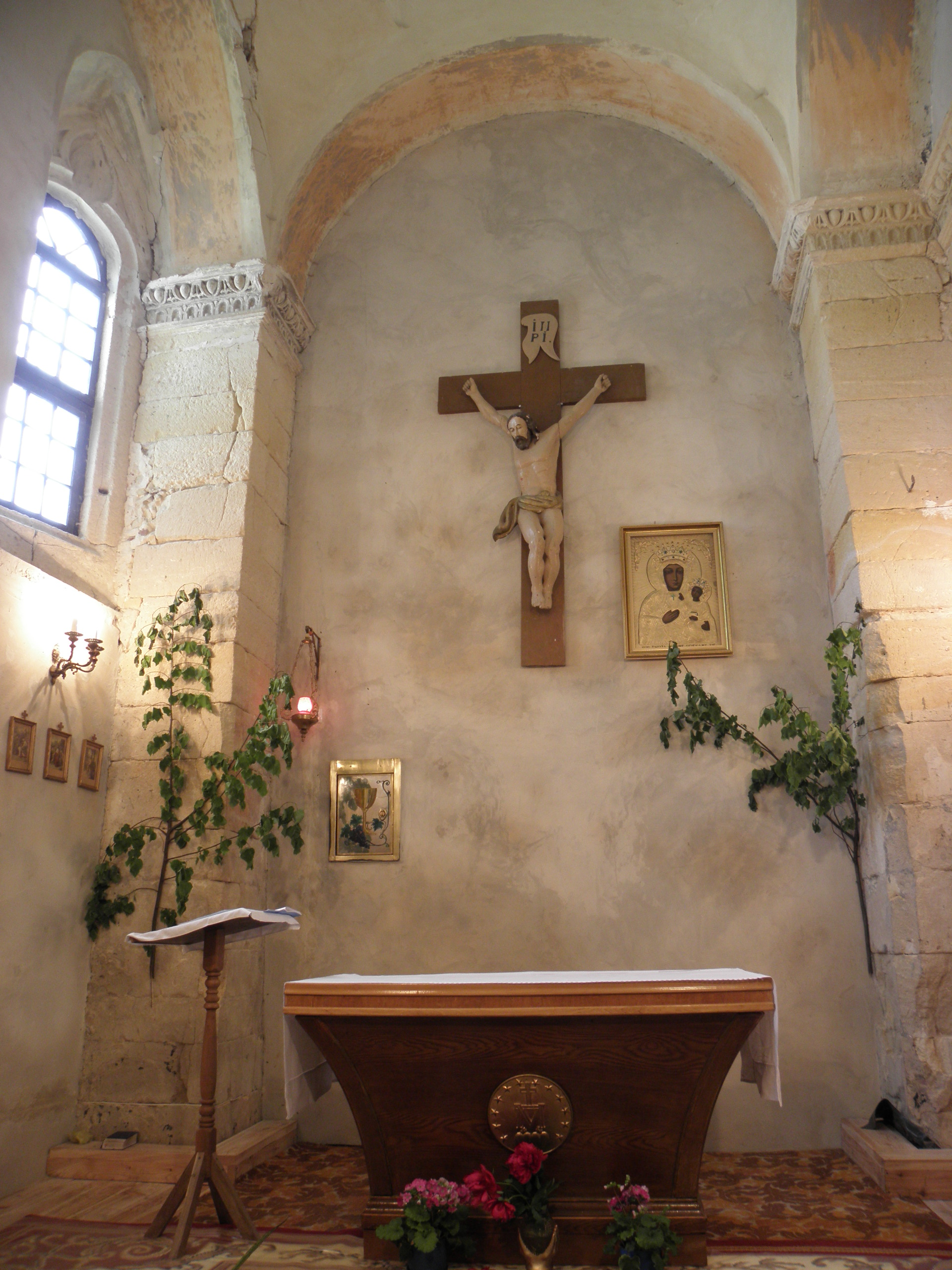 Wewnątrz wyremontowanej kaplicy Zofii z Zamiechowa kościoła rzymsko-katolickiego Trójcy Świętej w Podhajcach (Підгайці)